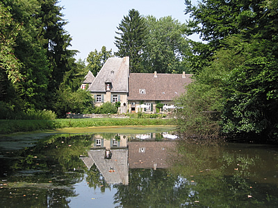 Ansicht des Hauses Welschenbeck (Warstein-Belecke) von Süden.